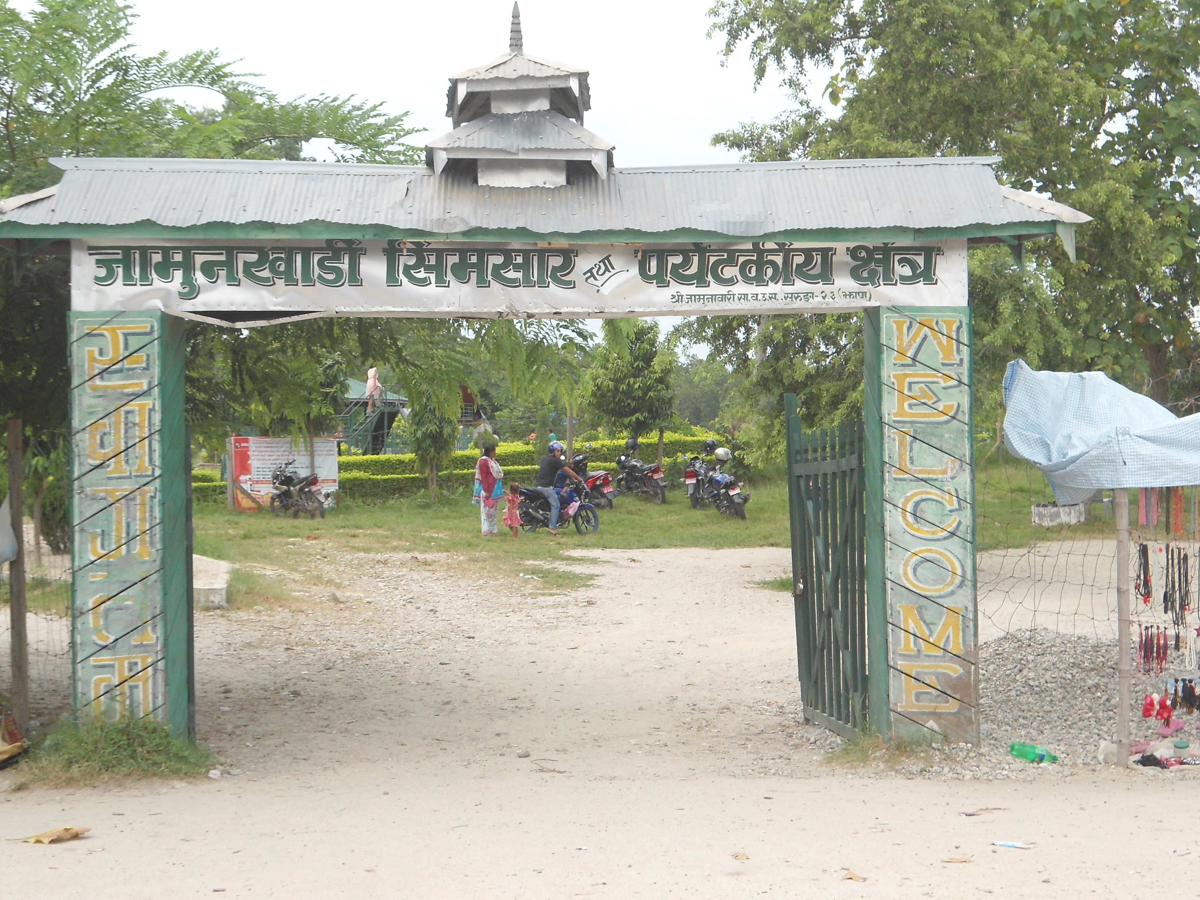 नेपाली: जामुनखाडी सिमसार क्षेत्रको प्रेवेस द्वार